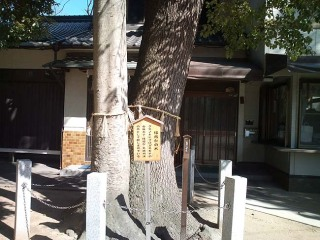 境内の御神木